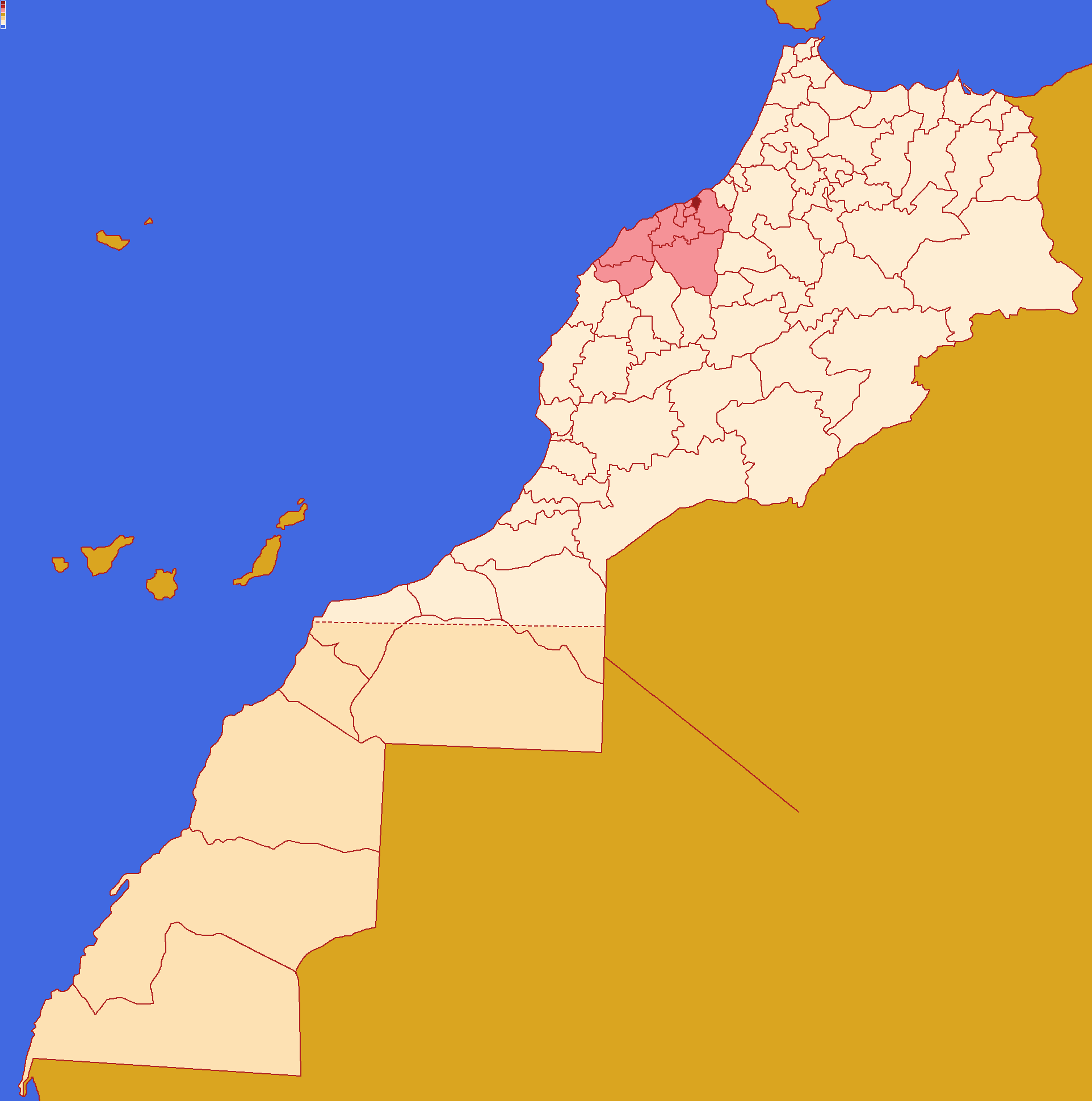 Localização da prefeitura de Mohammedia , dentro da região de Casablanca-Settat e dentro de Marrocos. Conforme a reforma administrativa de 2015.